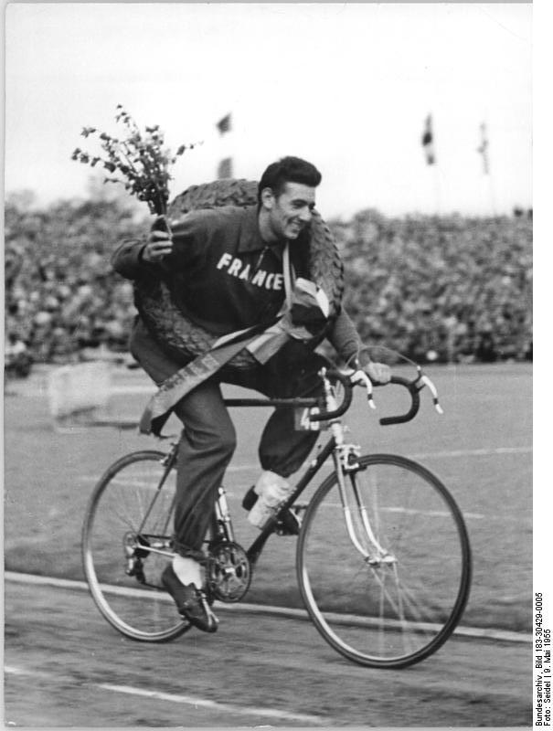 VIII. Friedensfahrt, Pierre Gouget Zentralbild Seidel 9.5.1955 - VIII. Internationale Friedensfahrt Prag-Berlin-Warschau 1955 (6. Etappe von Dresden nach Karl-Marx-Stadt über 103 km). UBz: Der Etappensieger, der 23jährige Pariser Automechaniker Pierre Gouget, fährt die Ehrenrunde.